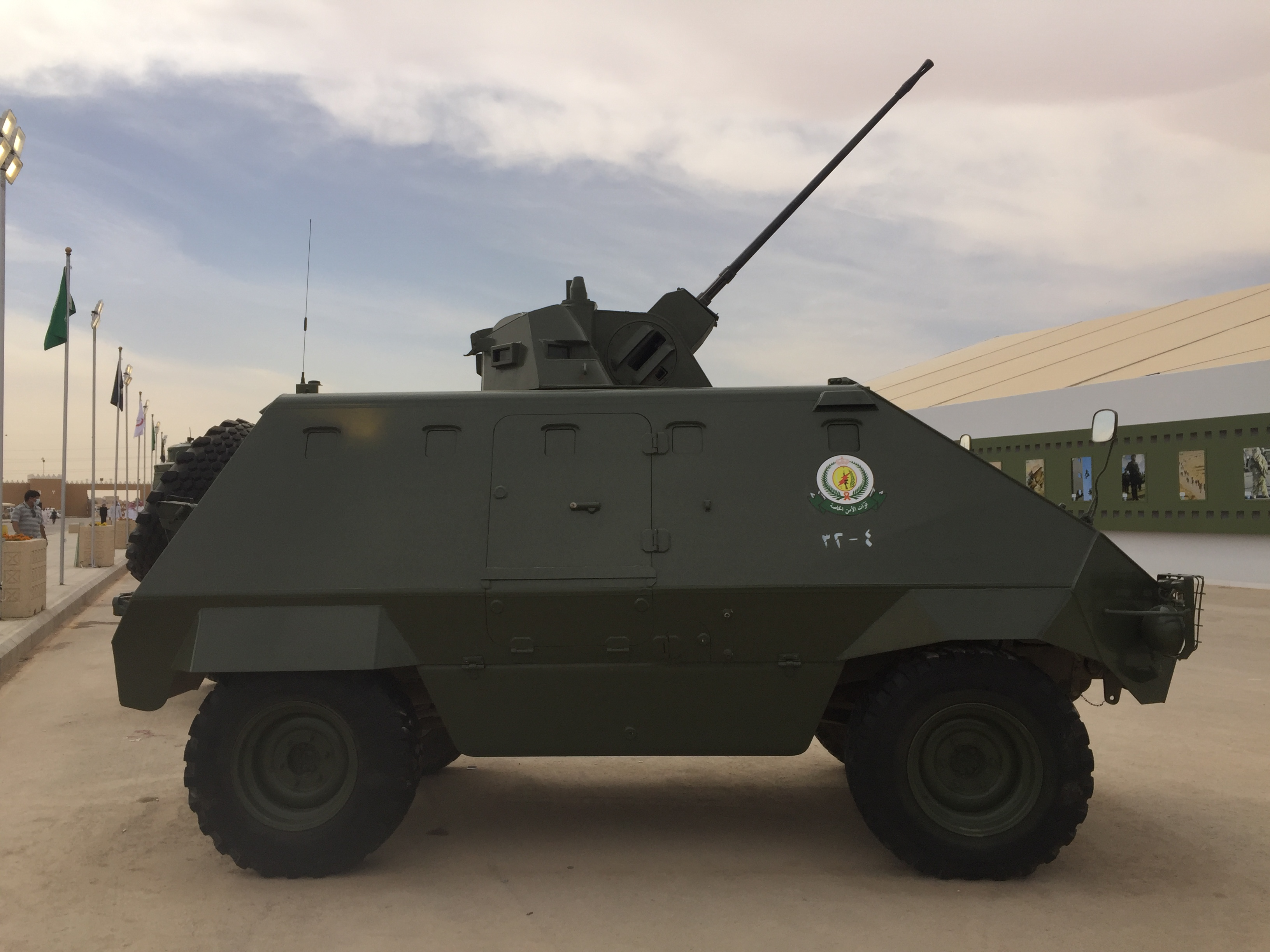 صور لإحدى المركبات التابعة لقوات الأمن الخاصة أثناء رحلتي إلى الجنادرية.